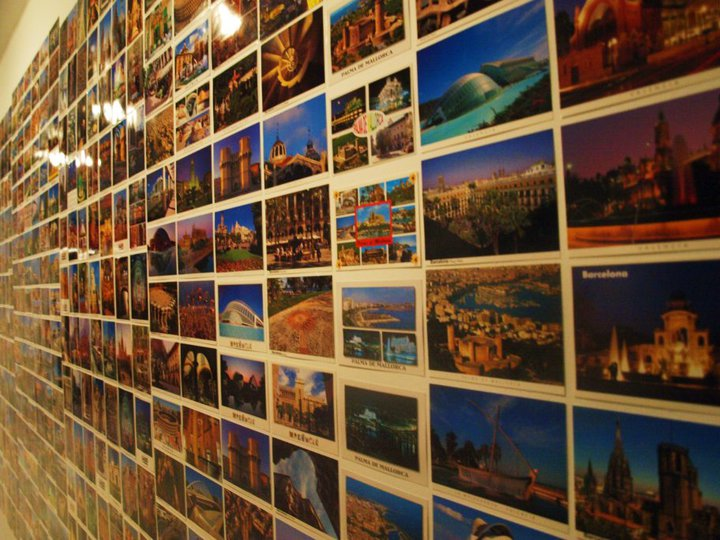 Photo by Rosalba Casalnuovo